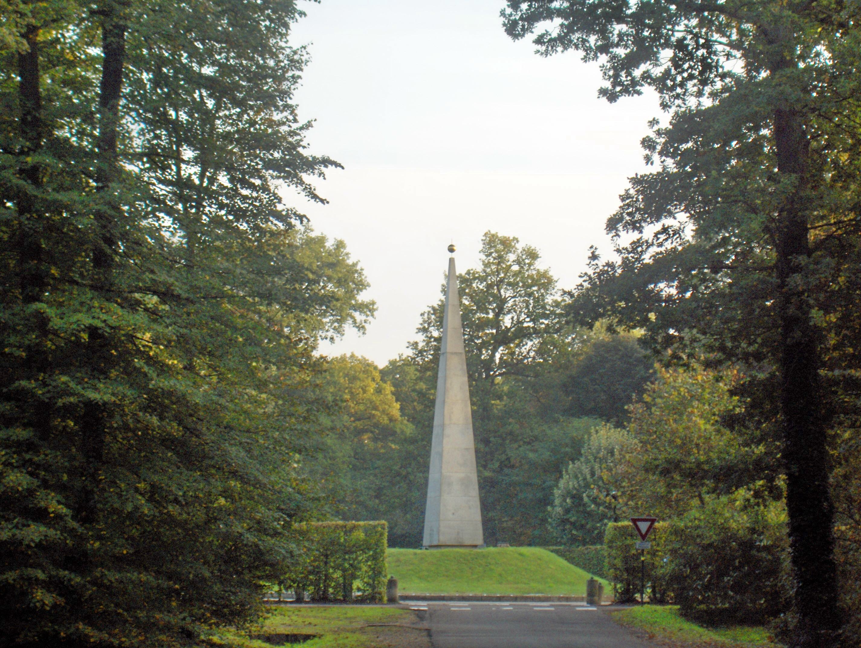 Construction pyramidale sur la route départementale 64 dans la forêt de L'Isle-Adam